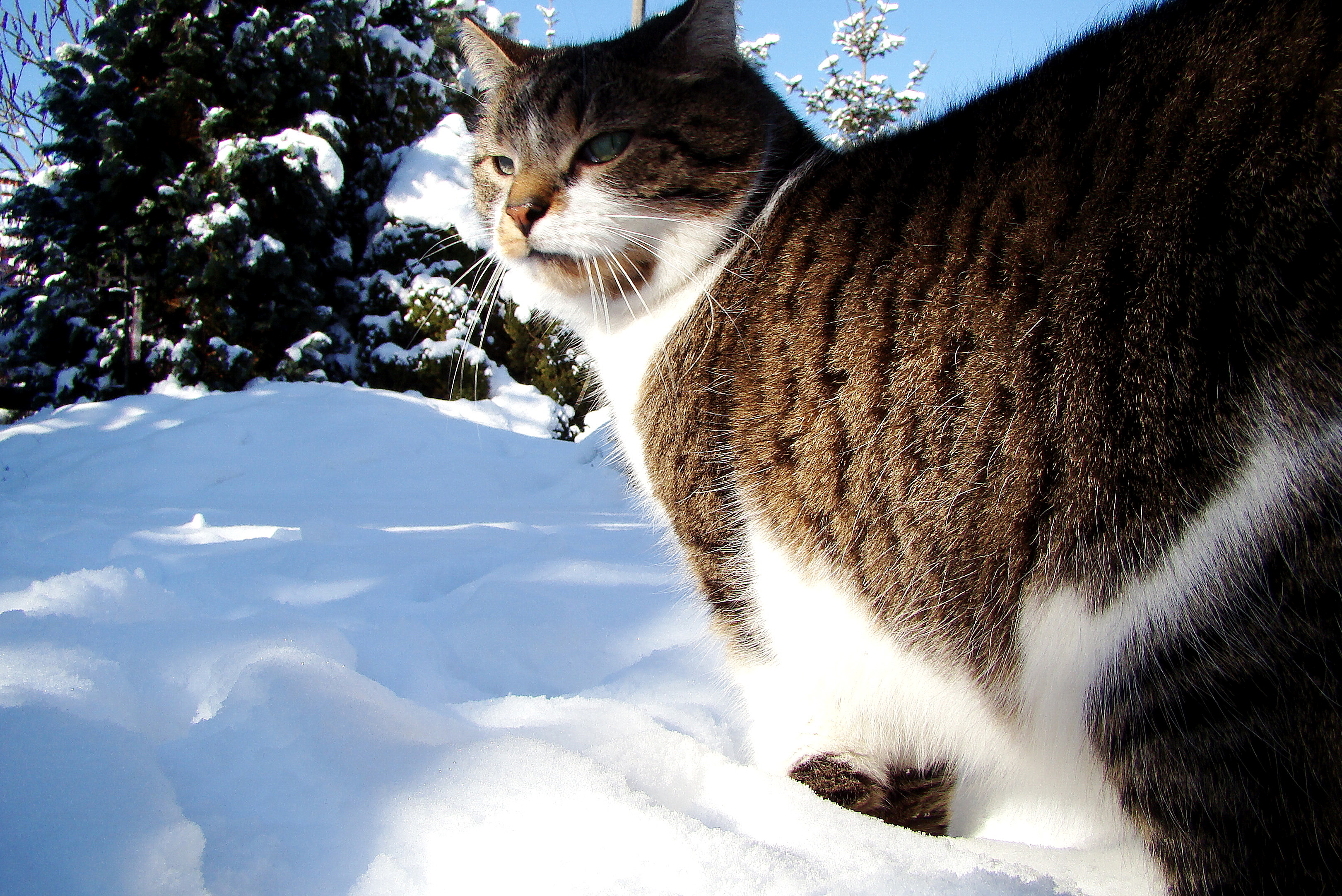 Po obfitych opadach śniegu, kocica nie ma ochoty na spacer.